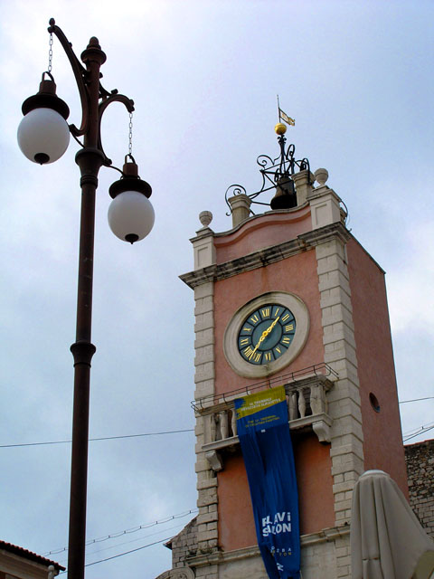 Zadar